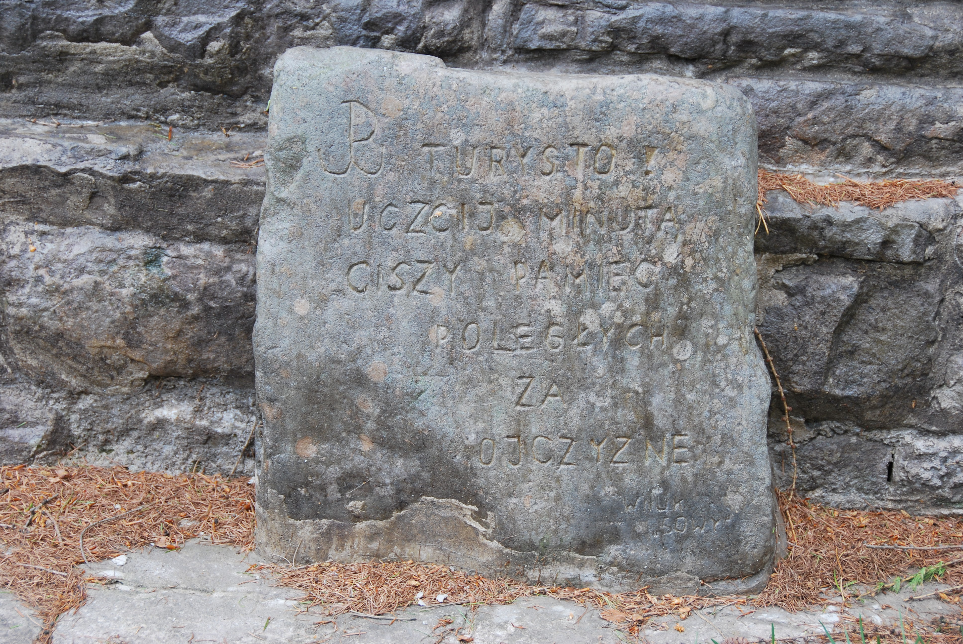 Boczna strona obelisku na Hali Malinowej upamiętniającego pacyfikację osiedla Maliny przez hitlerowców 13.10.1944 r.